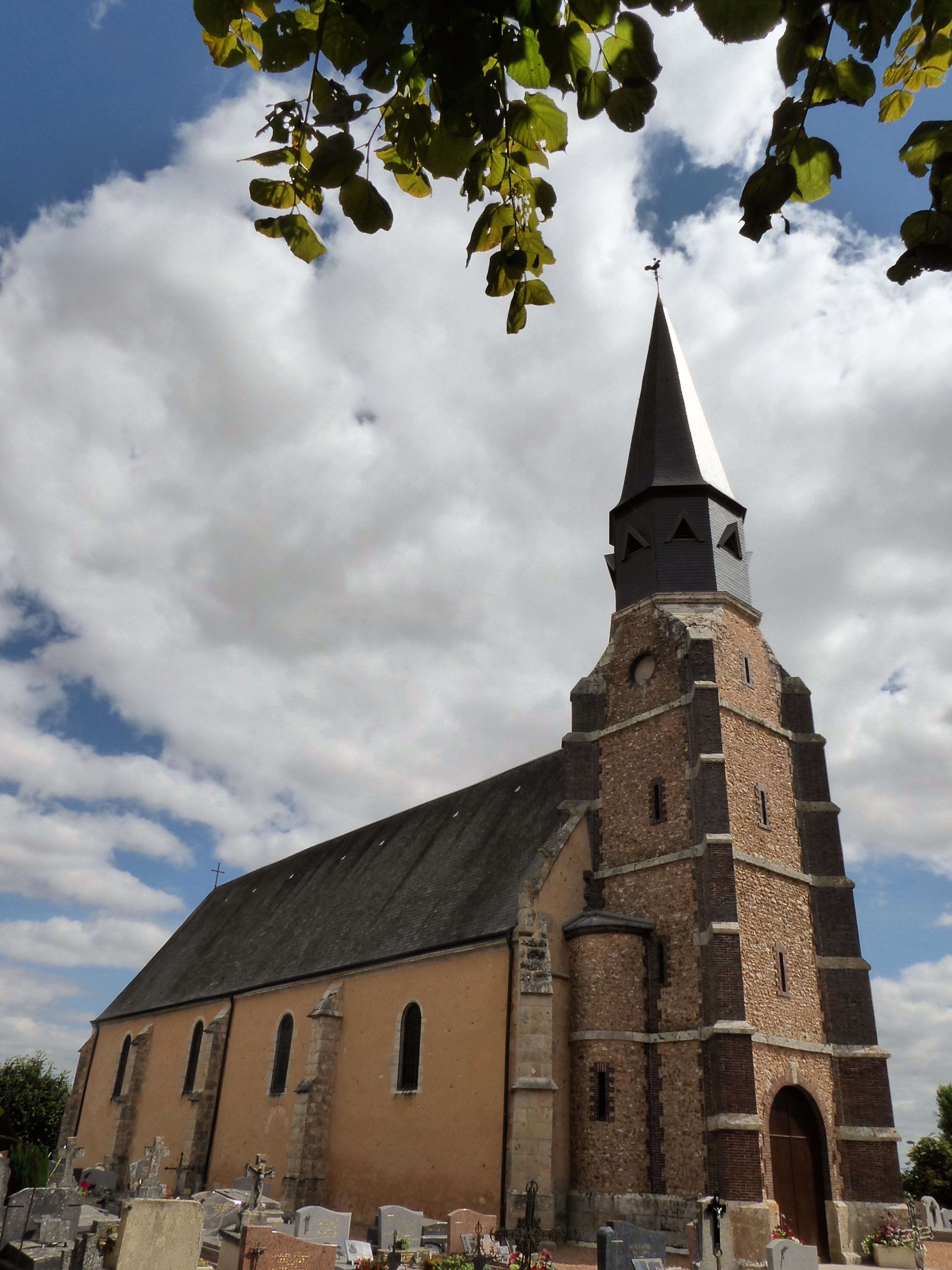 église Saint-Aubin, Saint-Aubin-des-Bois, Eure-et-Loir, France.